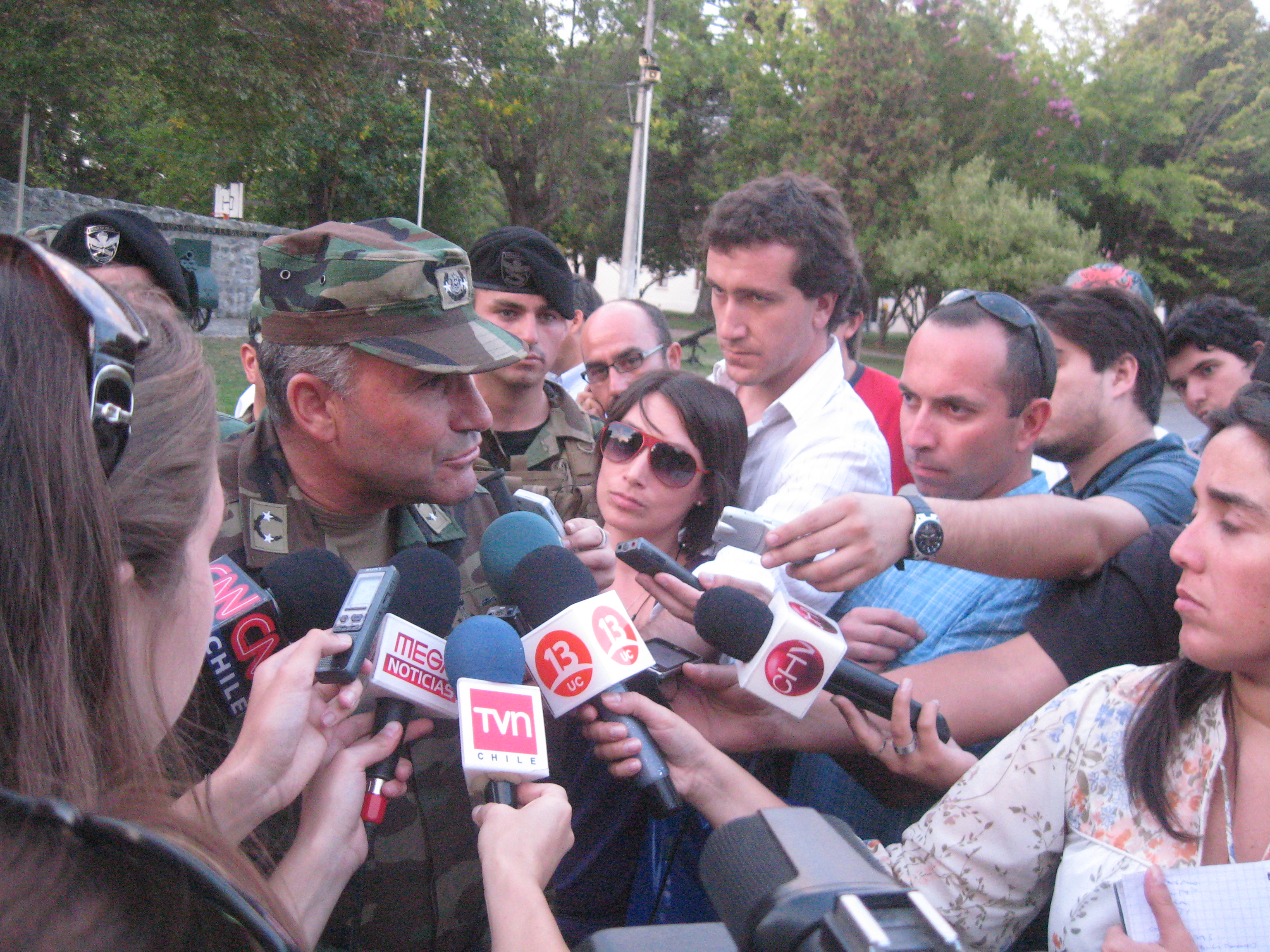 En el Regimiento de Talca, el jefe de plaza, general Bosco Pesse, explica a la prensa la operación de ayuda a la víctimas.